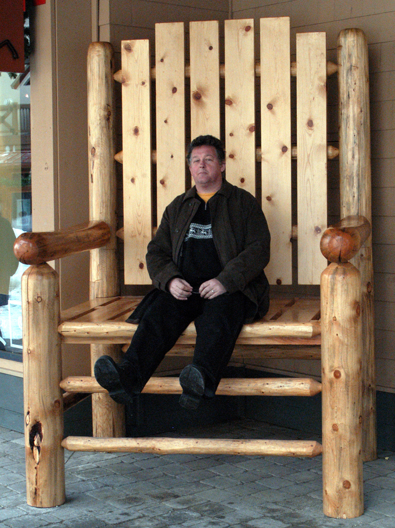 Prof. Dr. M. Herrmann, deutscher Immunologe an der Universität Erlangen